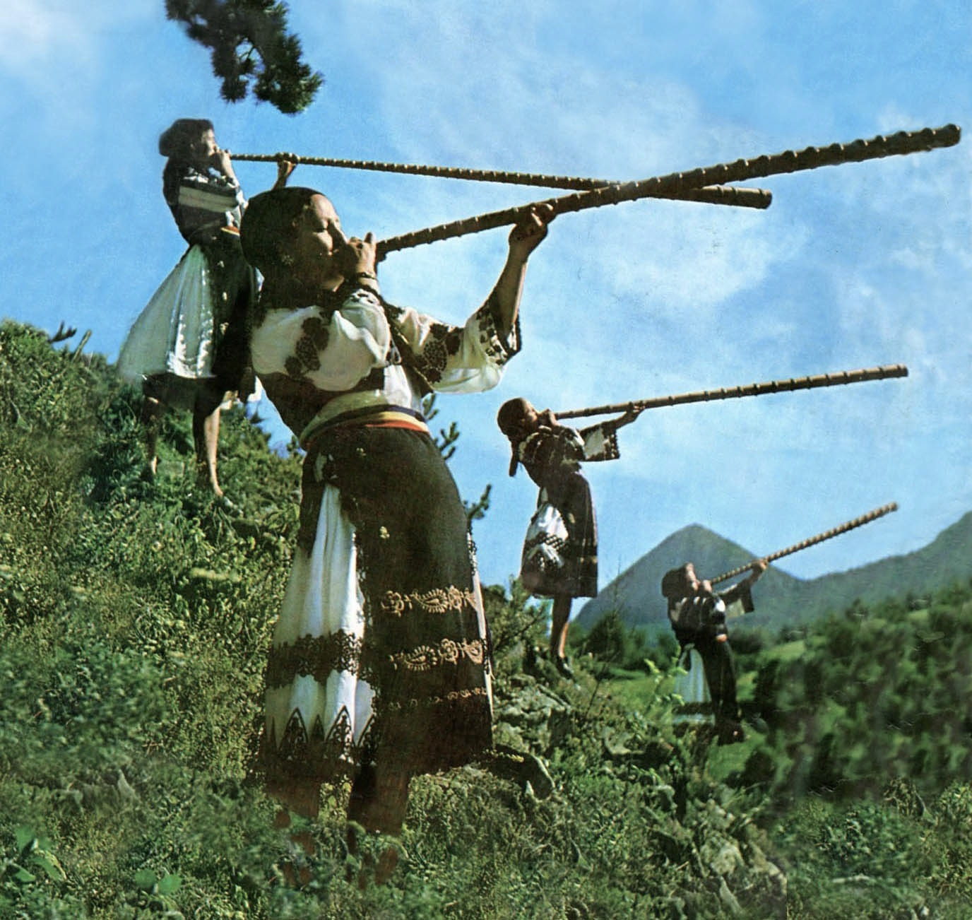 Tulnice (desen după fotografii vechi colorizate)